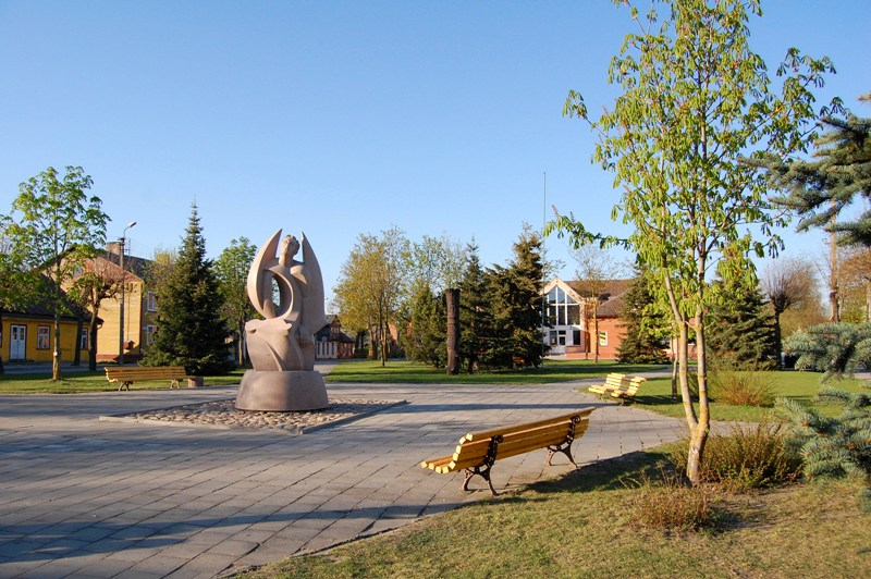 Vabalninko centras